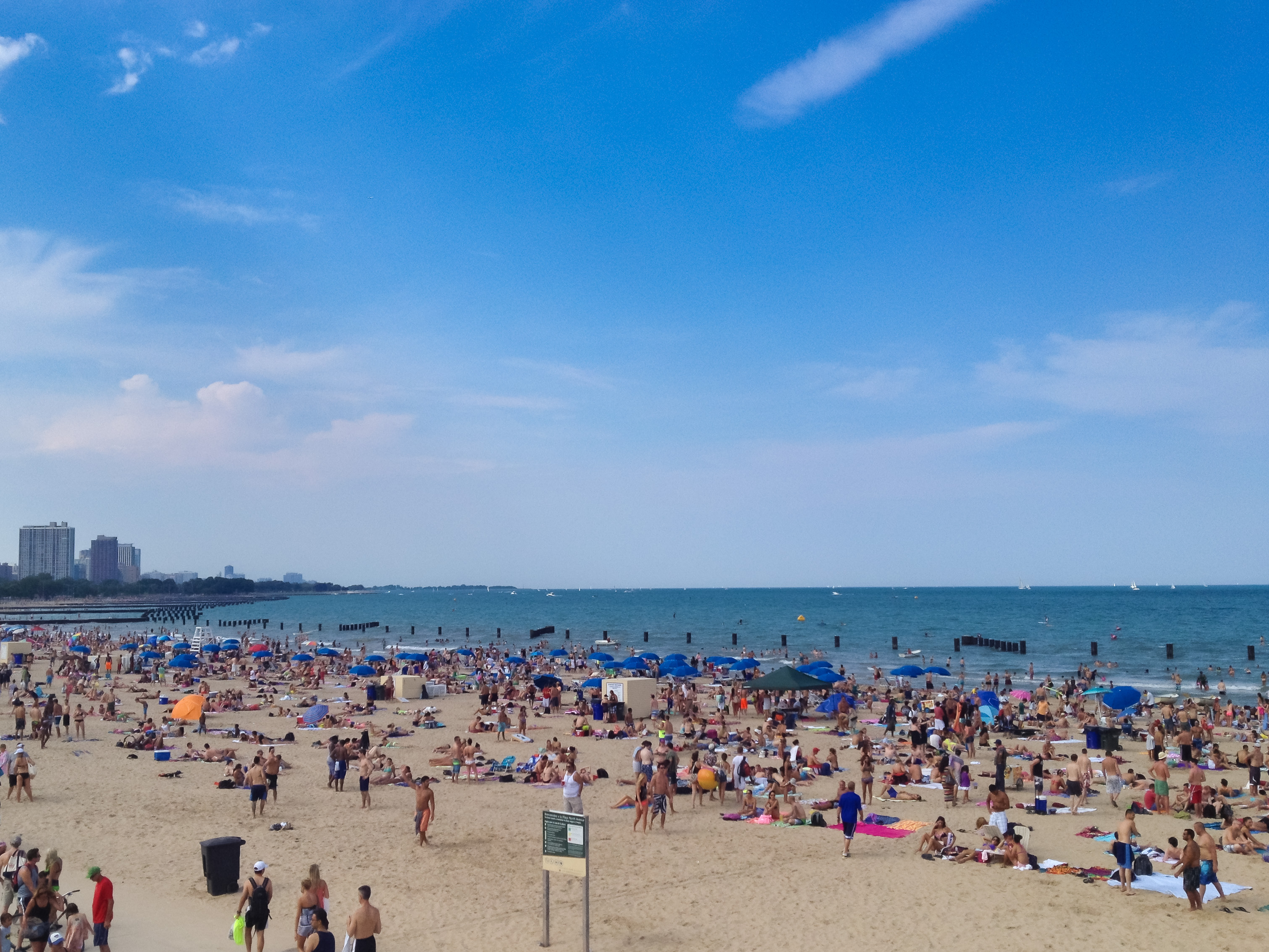 Chicago ist mit über 30 Stränden an den Great Lakes und seinen Sehenswürdigkeiten sehr vielseitig.